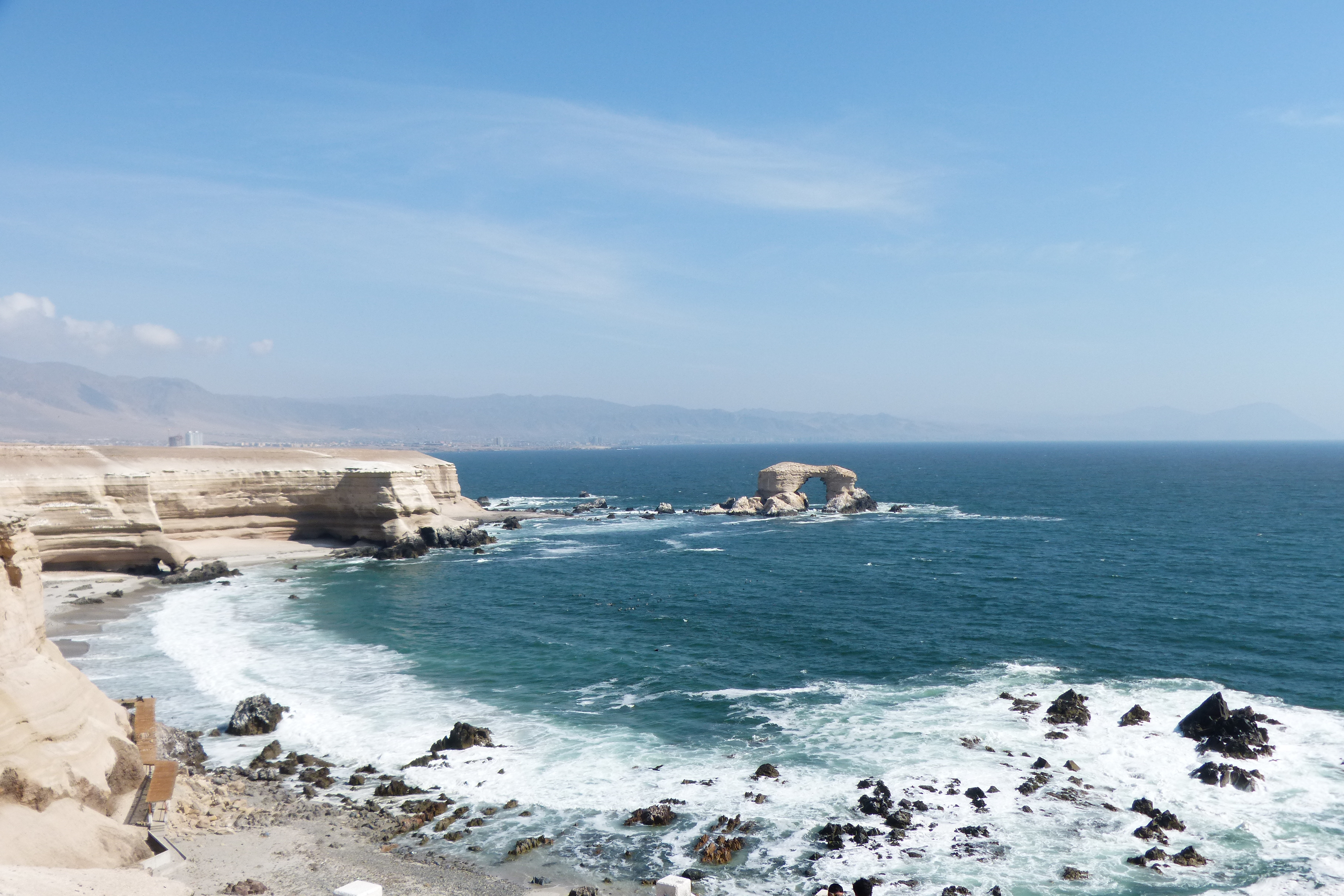 Vista actual del monumento, tomada en enero de 2013